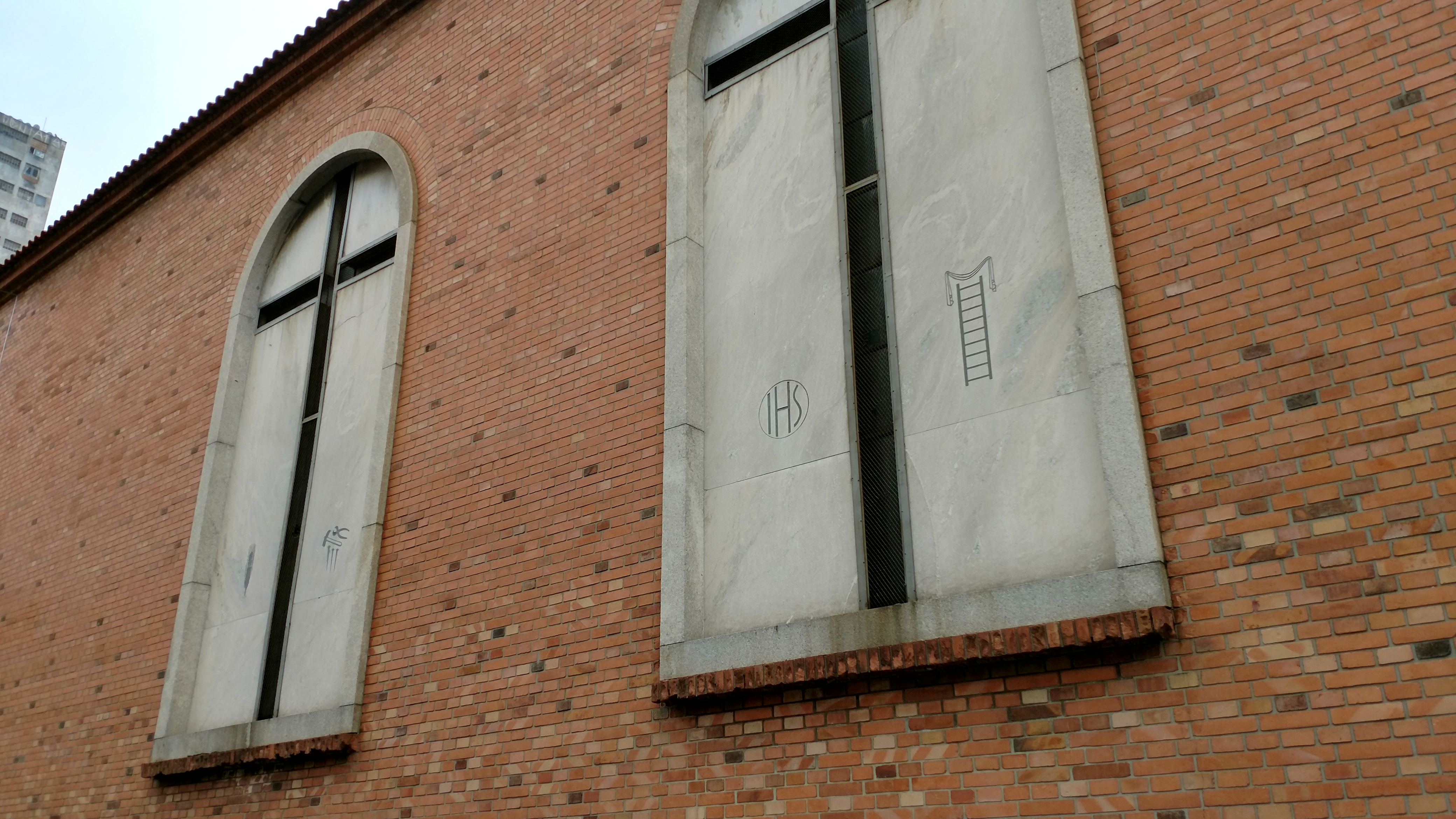 Detalhe de duas das janelas da face lateral da Paróquia Nossa Senhora da Paz em São Paulo (SP).